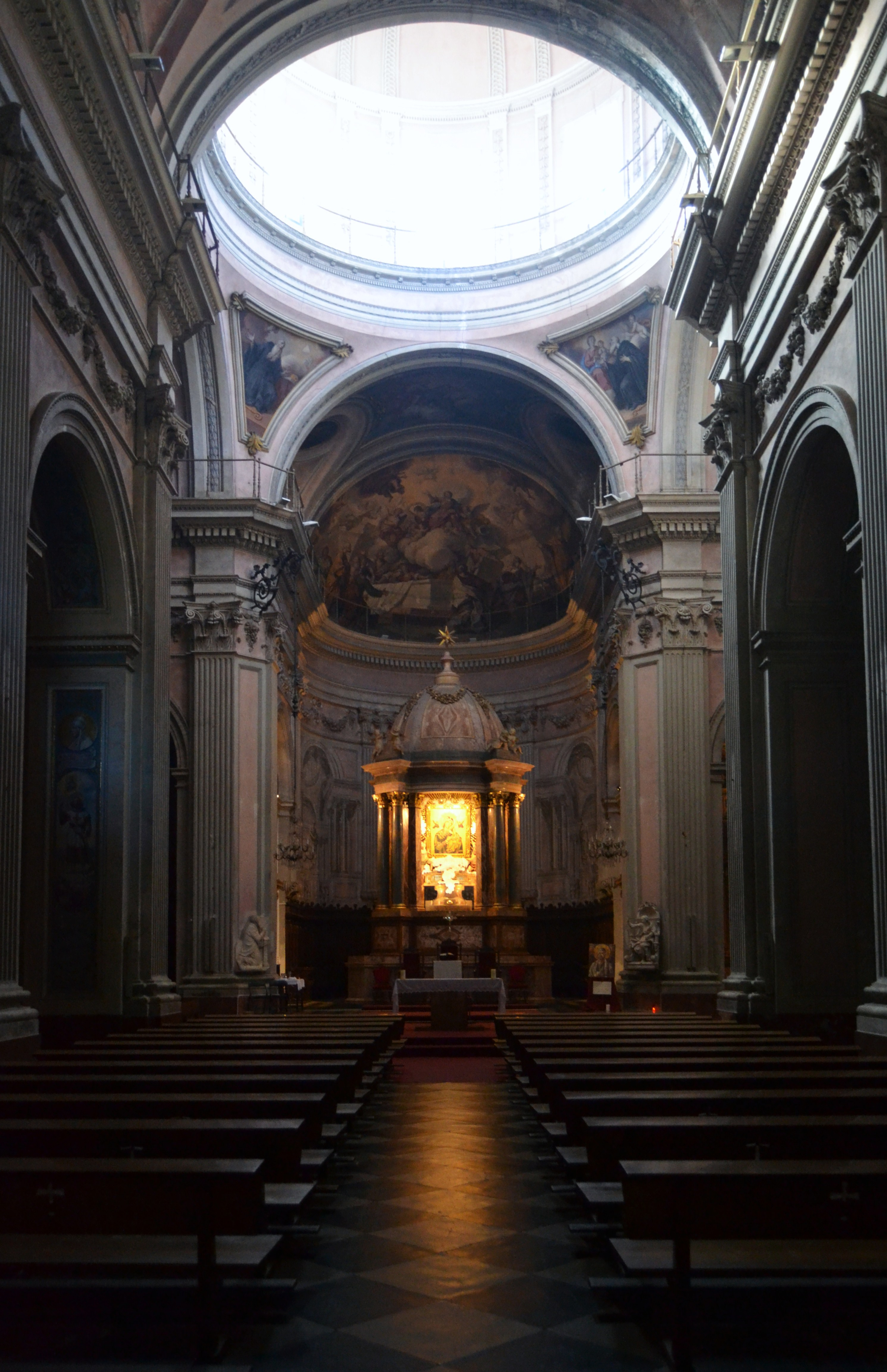 Interior de l'església de santa Maria del temple de València.